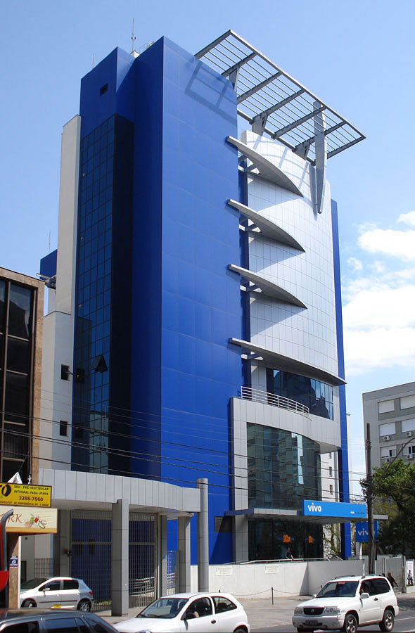 Sede da empresa Vivo em Porto Alegre, no bairro Independência